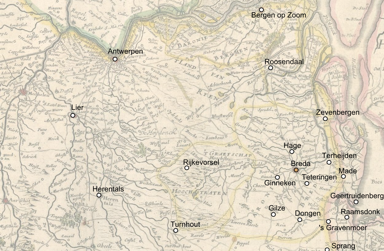 map van de omgeving van Breda